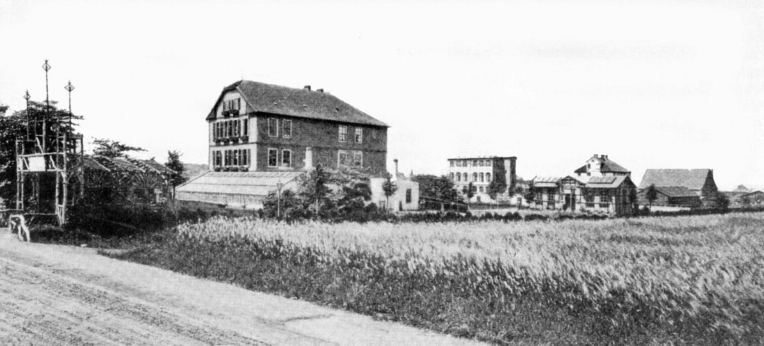 Gartenbauanstalt Ahlem um 1900